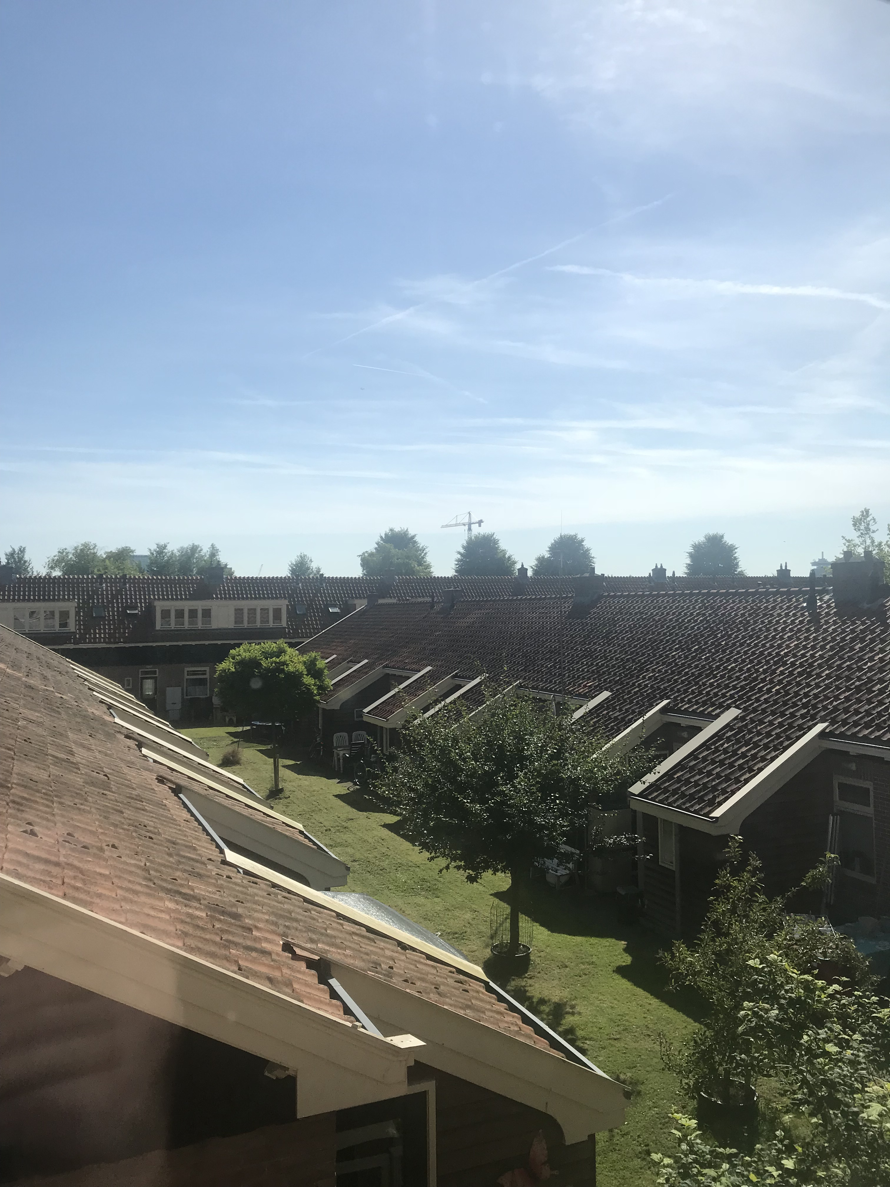 Vogeldorp Amsterdam-Noord uitzicht in zuidwestelijke richting, vanaf achtergevel Zamenhofstraat, juni 2018.